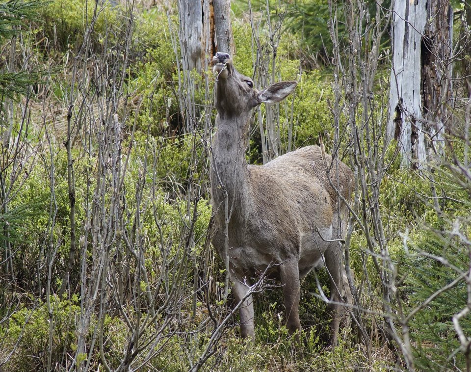 Jeleń europejski (Cervus elaphus), łania